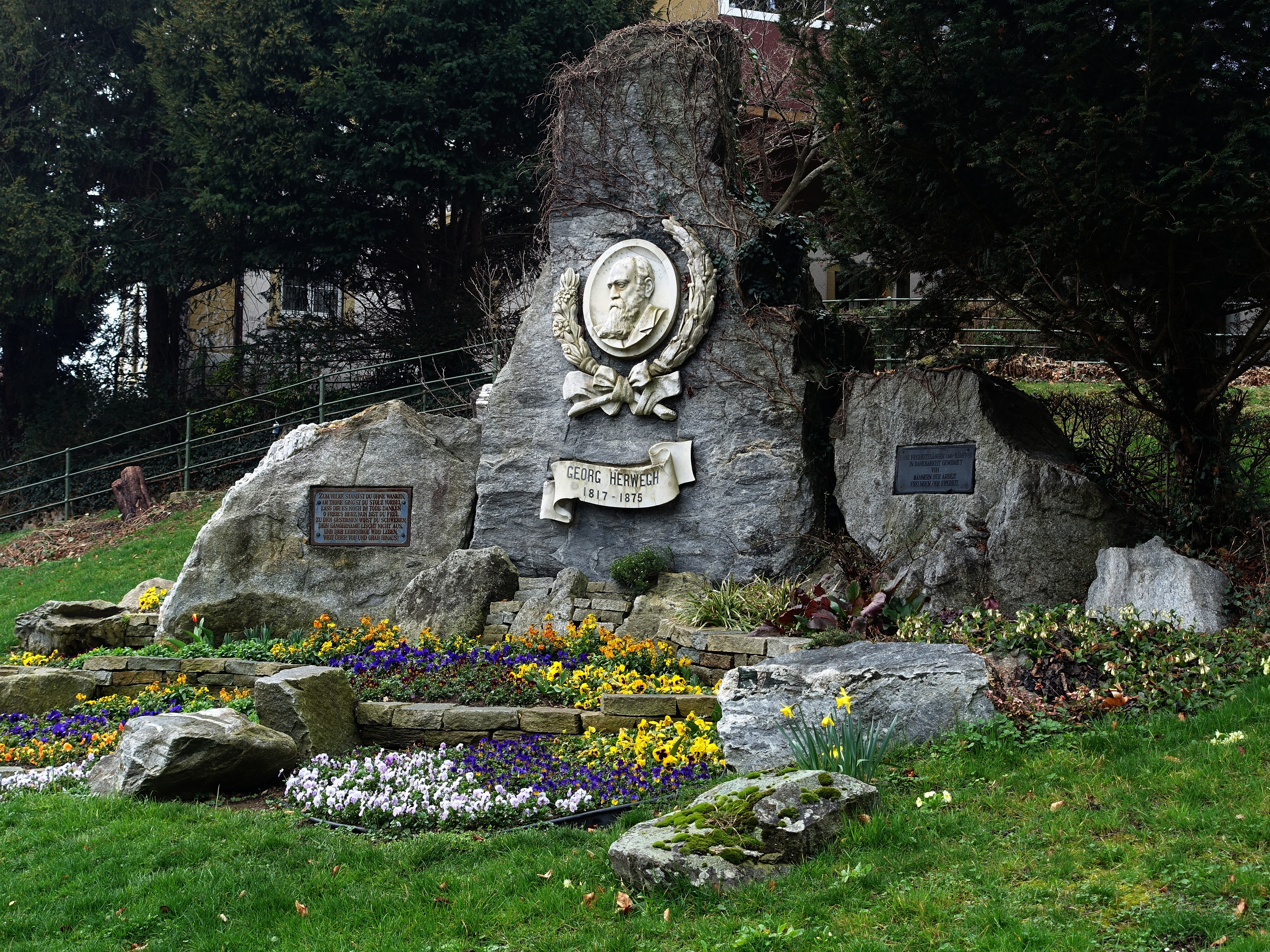 Denkmal für Georg Herwegh (1817–1875) revolutionärer Dichter, Übersetzer, Journalist in Liestal. Standort. 47°29'04.8"N 7°43'58.4"E, Inschrift: Dem Freiheitssänger und Kämpfer. In Dankbarkeit gewidmet von Männern der Arbeit, Freunden der Freiheit. Zum Volke standst Du ohne wanken, am Trone gingst Du stolz vorbei, lass Dir es noch im Tode danken o freies Herz, nun bist Du frei. Zu den Gestirnen wirst Du schweben, dein Sängername lischt nicht aus, und der Lebendige wird Leben, weit über Tod und Grab hinaus!